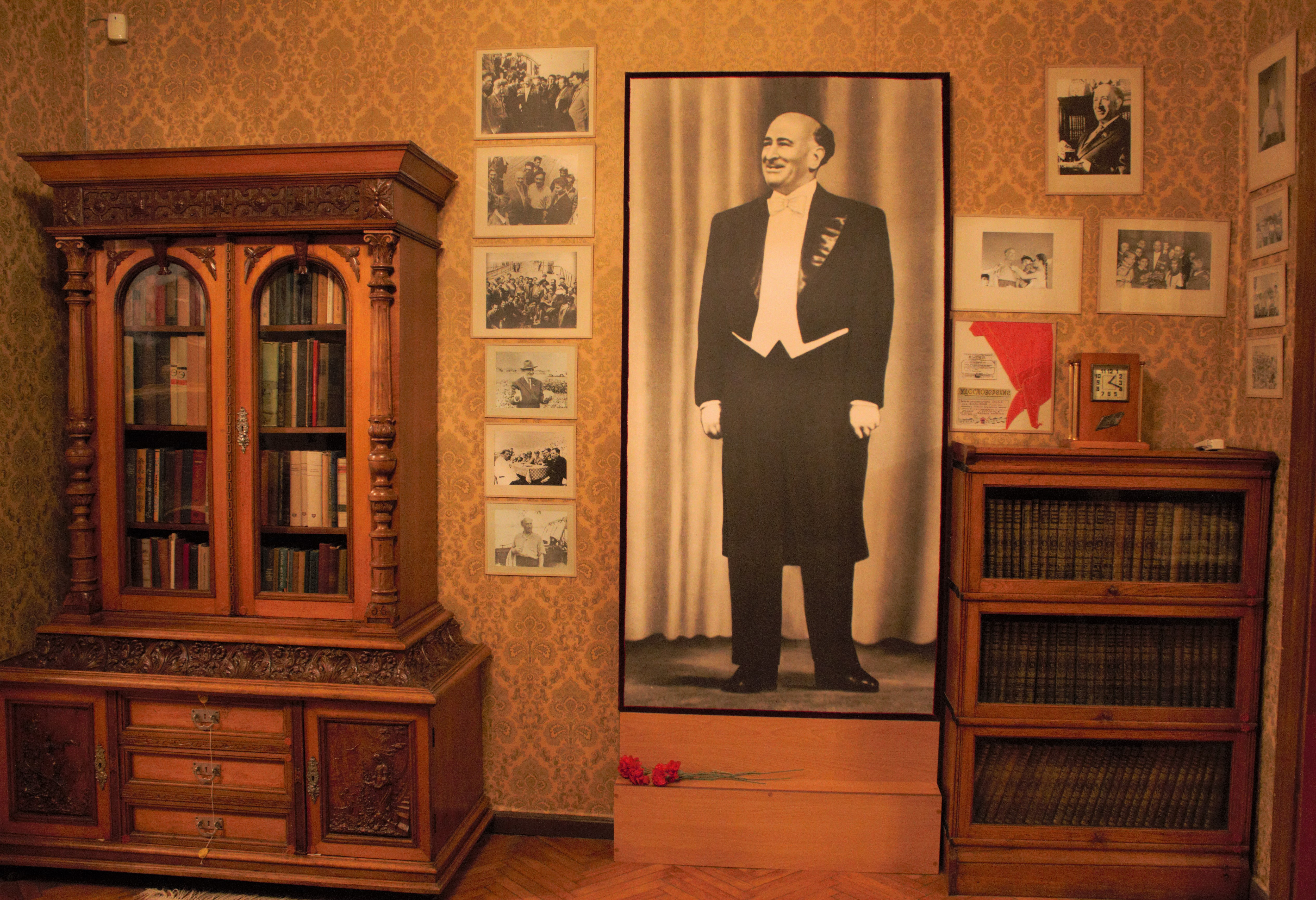 Интерьер кабинета Бюльбюля. Личная библиотека Бюльбюля. Мемориальный музей Бюльбюля.